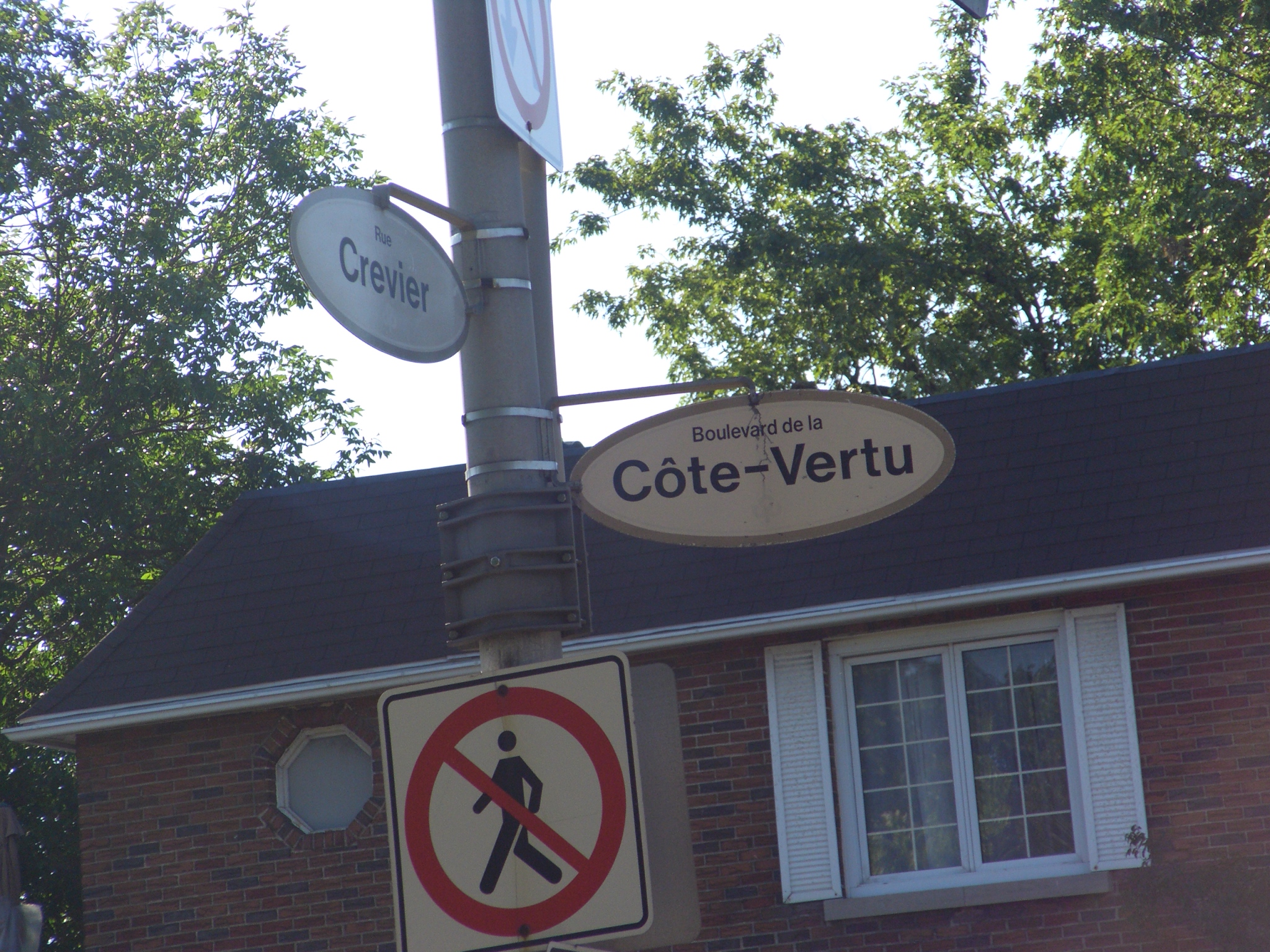 Boulevard de la Côte-Vertu près la rue Crevier, St-Laurent, Québec, Canada